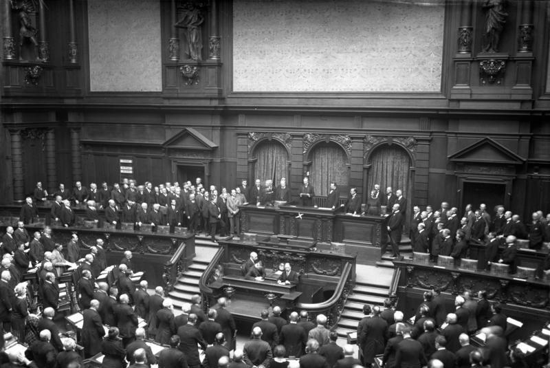 Die Amtseinführung des neuen stellv. Reichspräsidenten Dr. Walter Simons wurde am 12. März 1925 durch den Reichstagspräsidenten Löbe im Reichstag vorgenommen. Der stellv. Reichspräsident Simons x bei der Eidesleistung auf die Verfassung im Reichstag. Neben ihm Reichstagspräsident Löbe.